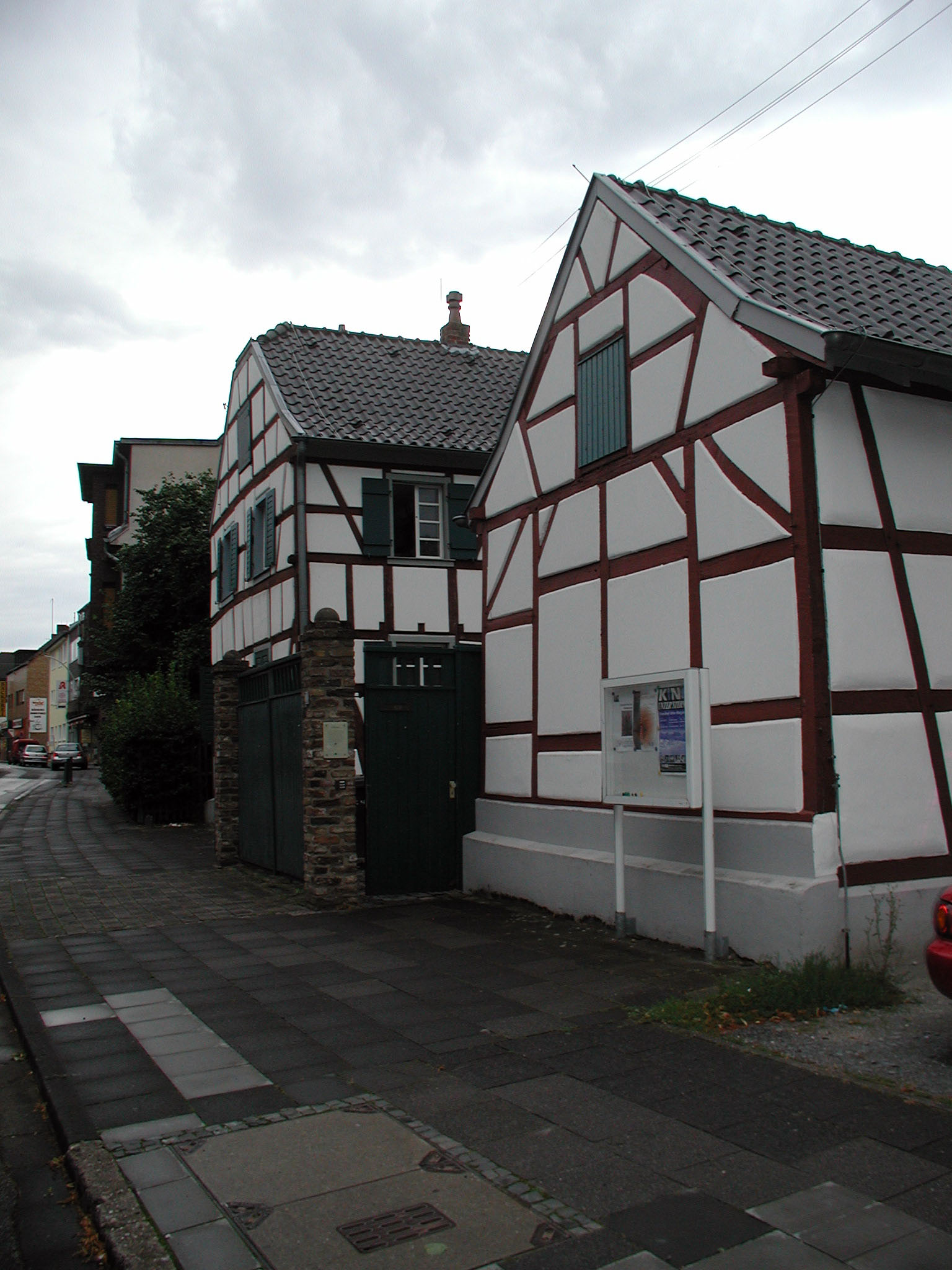 Löhrerhof, Alt-Hürth